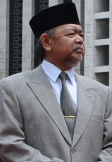 Imam Besar Masjid Istiqlal, K.H. Ali Mustafa Yaqub di Masjid Istiqlal, Jakarta ketika sedang menyambut Menteri Luar Negeri Amerika Serikat, John Kerry